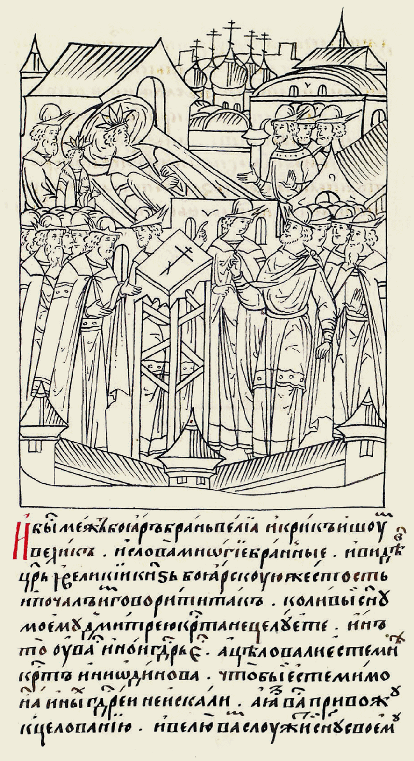 Миниатюра Лицевого летописного свода XVI в.: И была меж боярами брань великая, крик и шум, и слова многие бранные. И царь и ве- ликий князь, увидев боярскую жестокость, начал им говорить так: «Если вы сыну моему Дмитрию креста не целуете, то у вас иной государь есть? А цело- вали мне крест не оди- наково, чтобы помимо нас иных государей не искать. А я вас приво- жу к целованию и велю вам служить сыну своему 544 Дмитрию, а не За- харьиным. И я с вами много говорить не могу. А вы свои души забыли, и нам и на- шим детям служить не хотите, а на чем нам крест целовали, того не помните. А кто не хочет служить госу- дарю в пеленах, тот и в возрасте не за- хочет служить. И если мы вам не нужны, это пусть будет на ваших душах